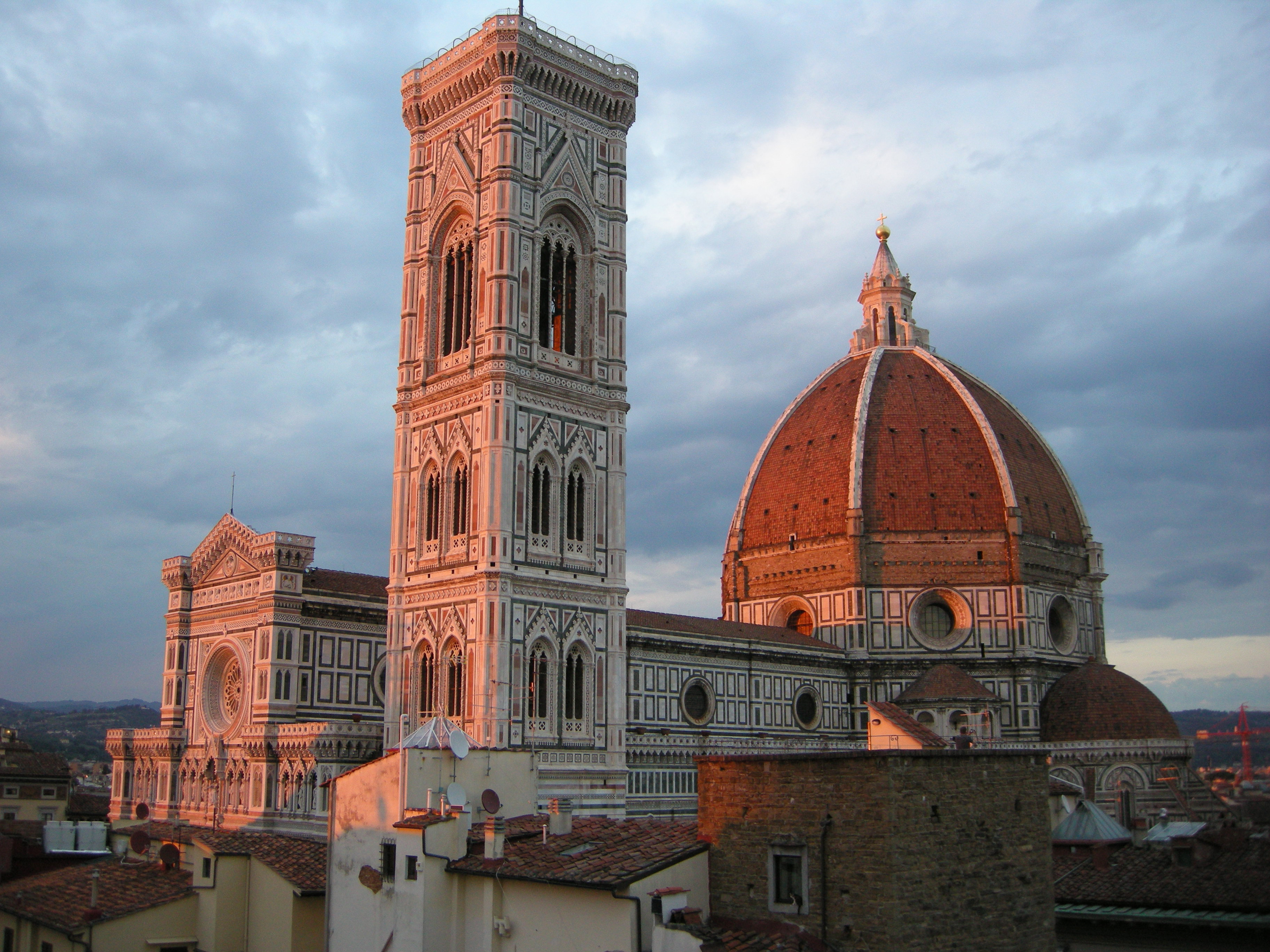 Firenze